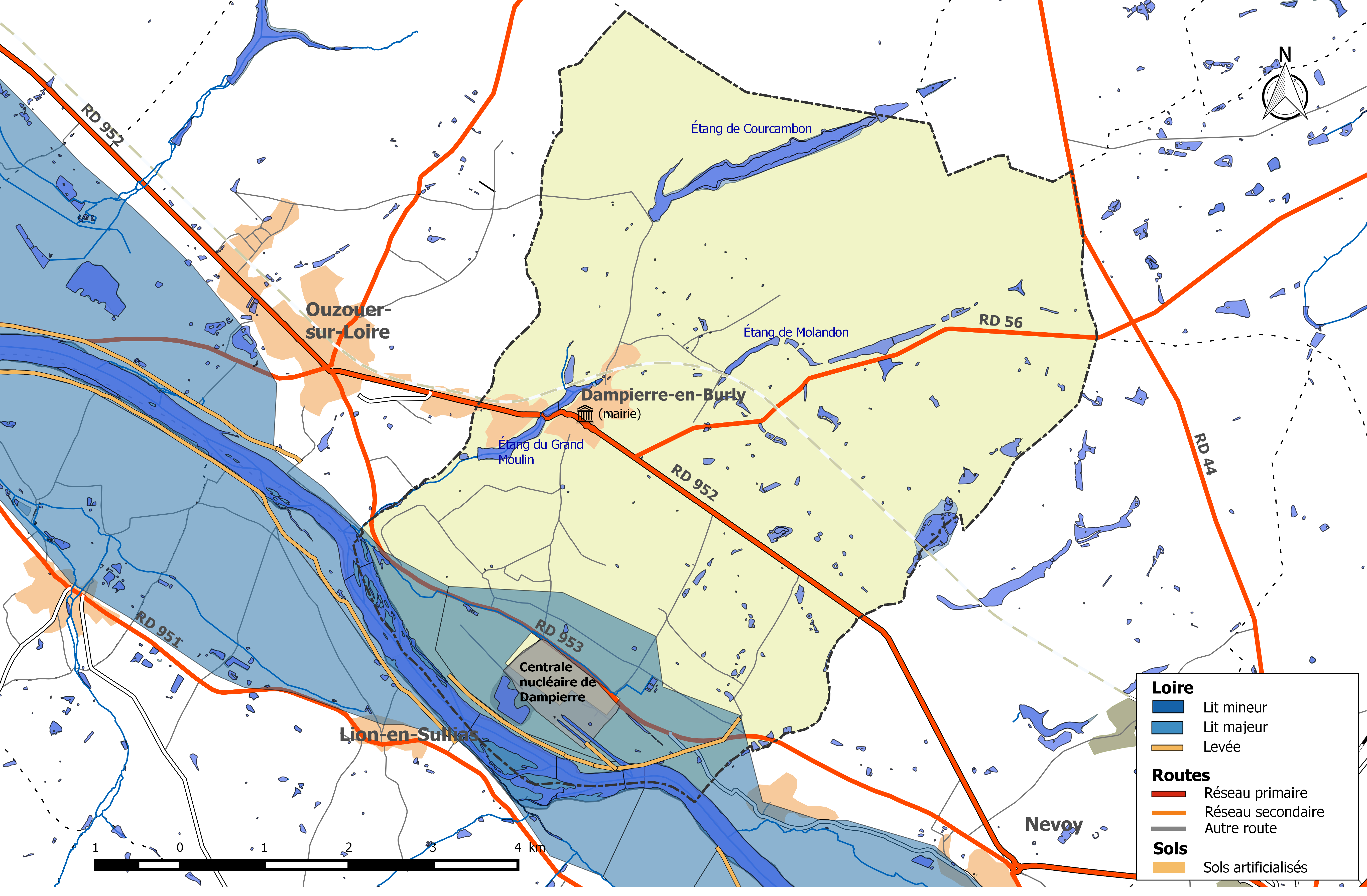 Zone inondable et réseaux hydrographique et routier de la commune de Dampierre-en-Burly.